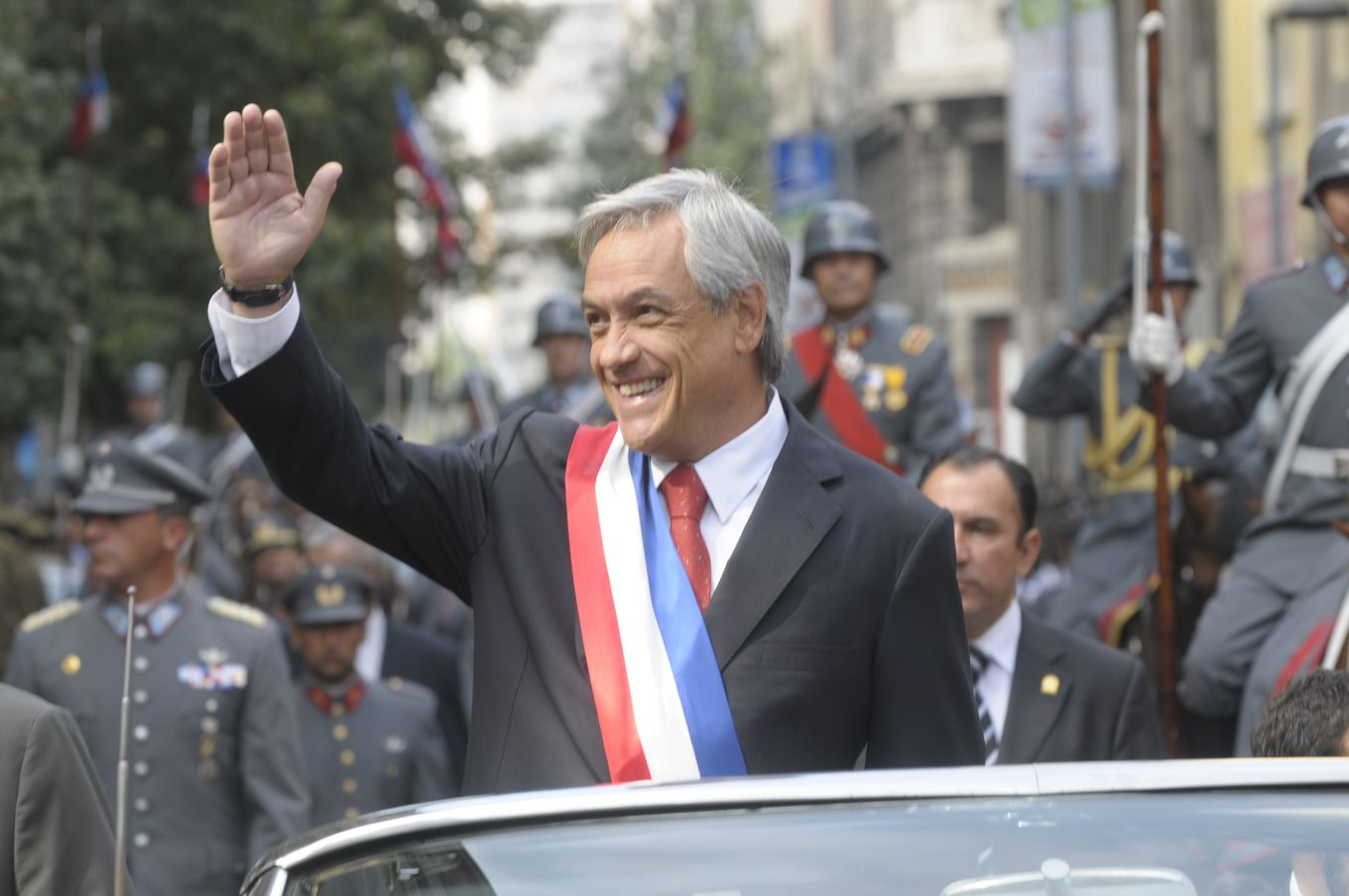 Sebastián Piñera con escolta presidencial. Postales de los 100 primeros días de gobierno.